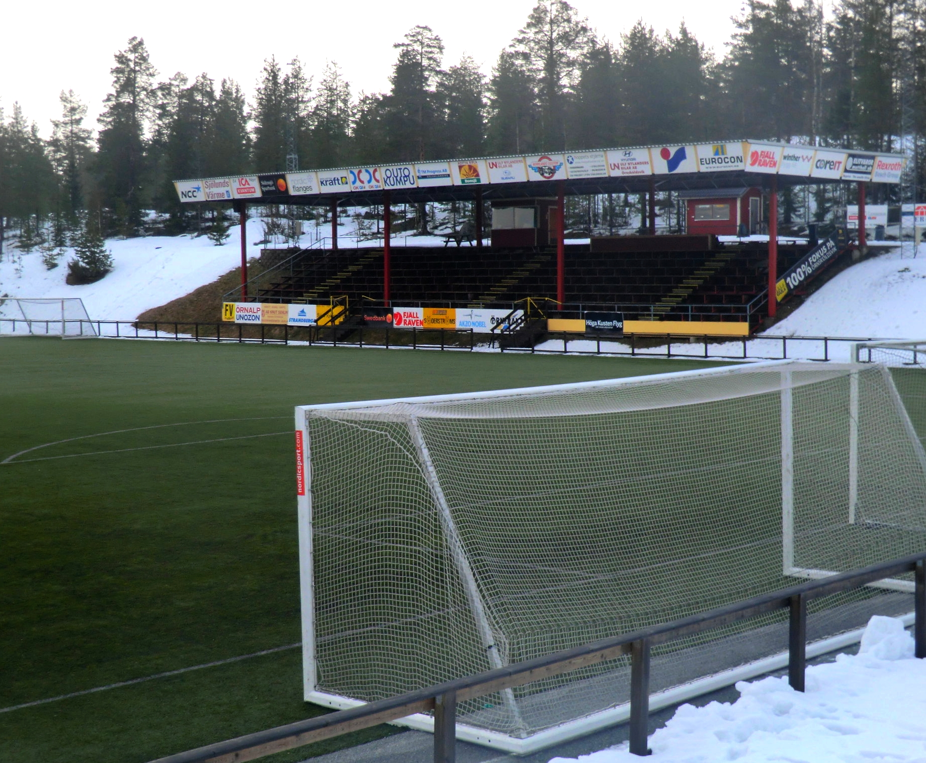 FVs hemmaplan, en konstgräsplan på Skyttis IP.